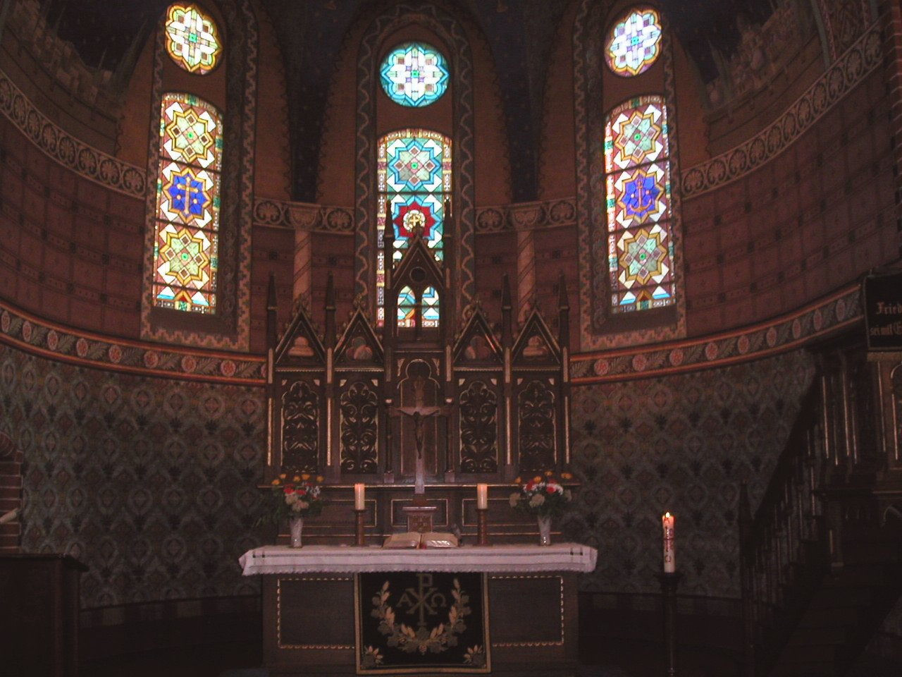 Verklärungskirche (Adlershof) - Altarraum